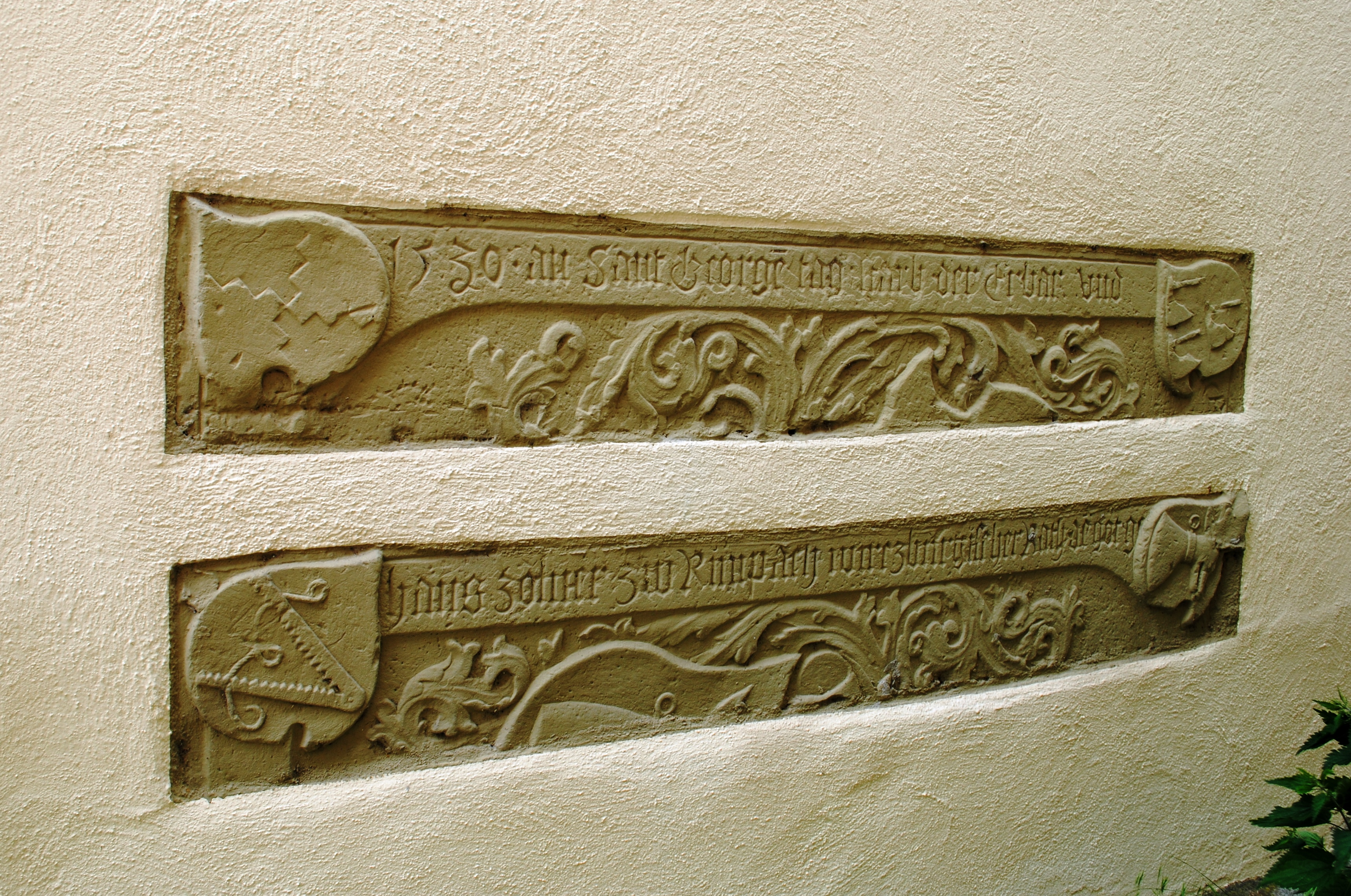 Epitaphienreste, Kirche, Rimbach, außen